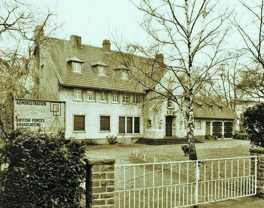 BFBS Cologne Lindenalle 1